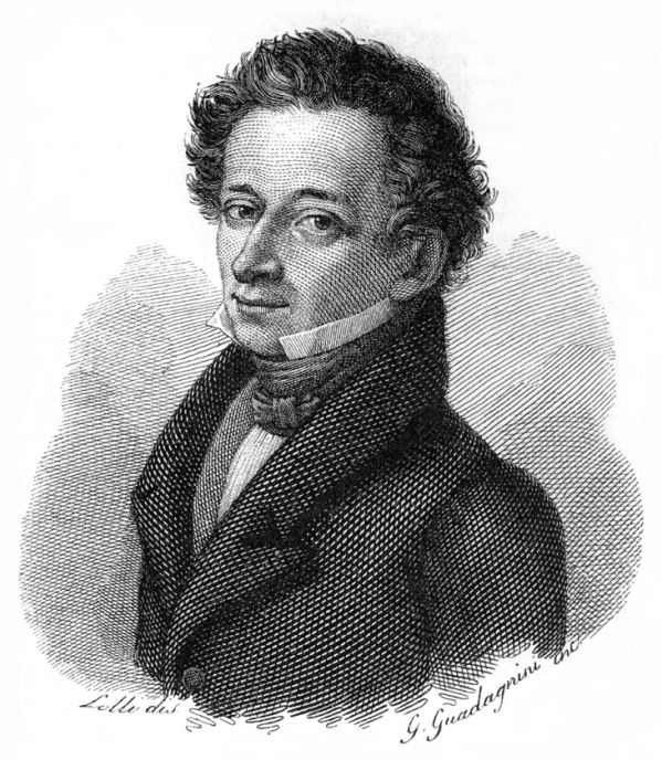 Portrait of Giacomo Leopardi